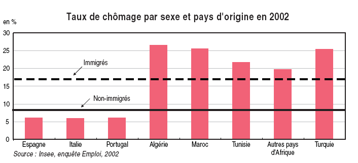 Tasa de paro en Francia en 2002 según el país de origen.